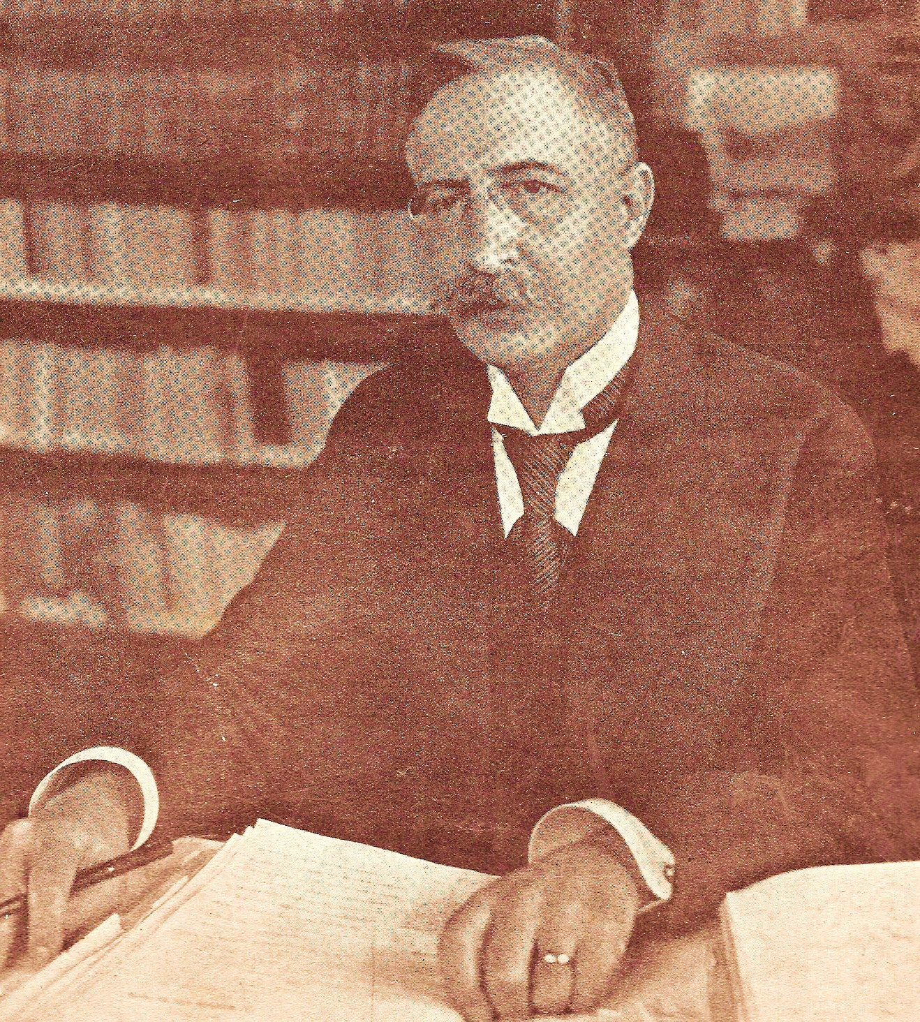 Dr E. Moresco